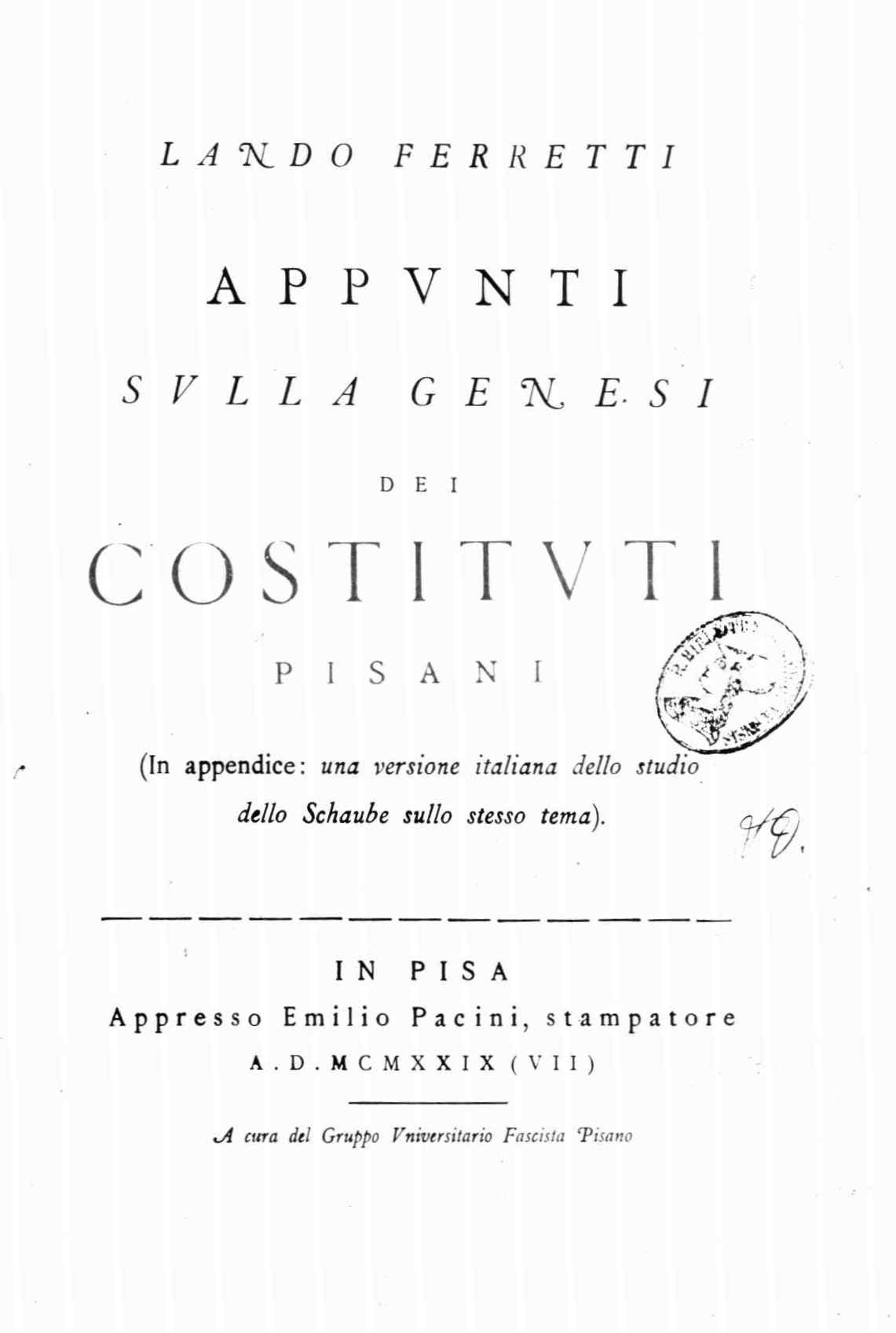 Frontespizio